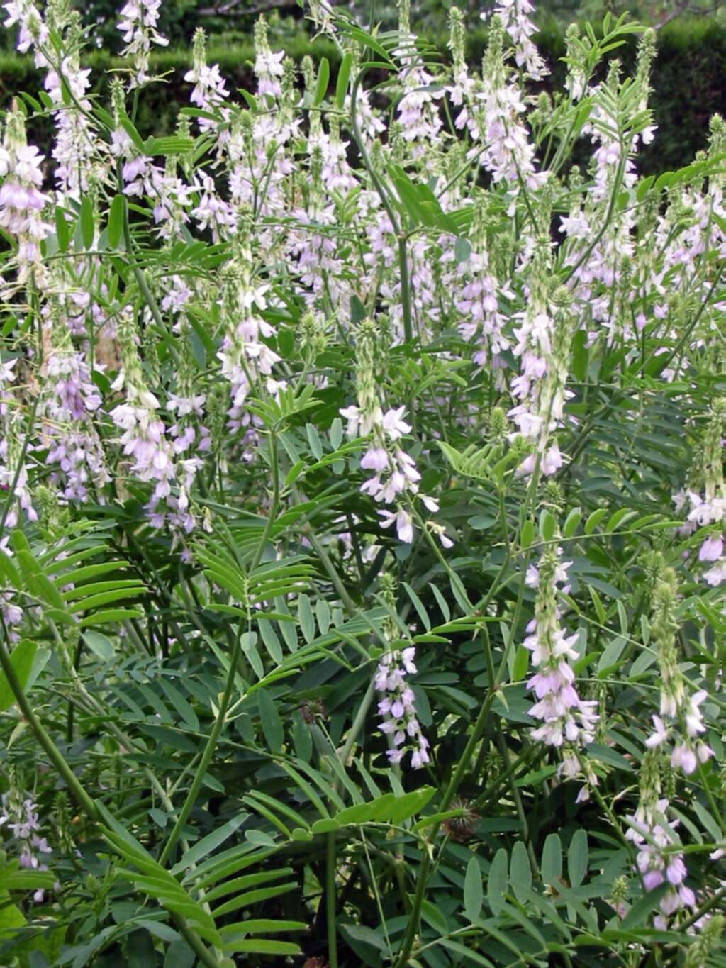 Galéga officinal Photo JH Mora, juin 2005